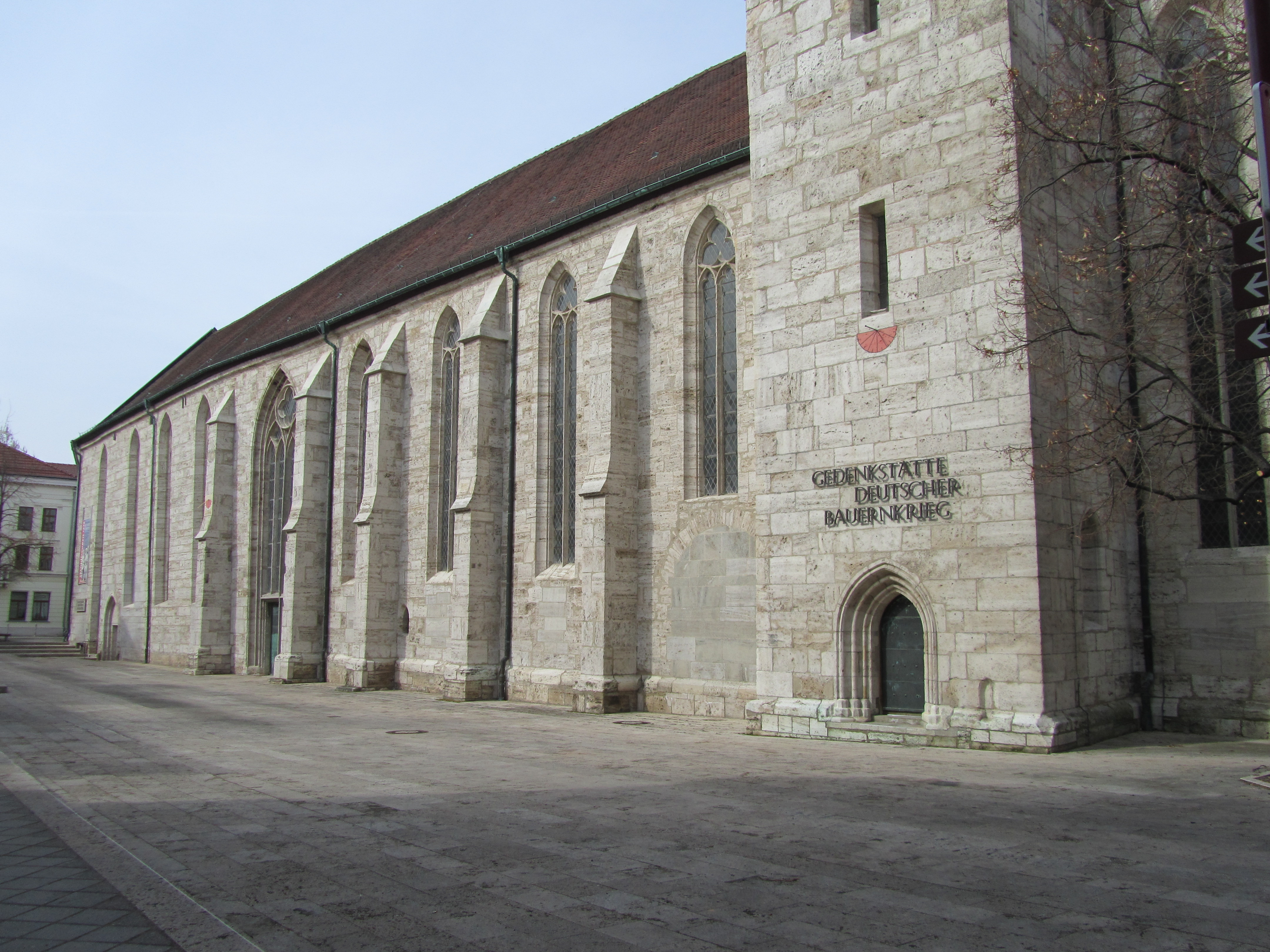 Das Schiff der Kornmarktkirche in Mühlhausen (Thüringen).